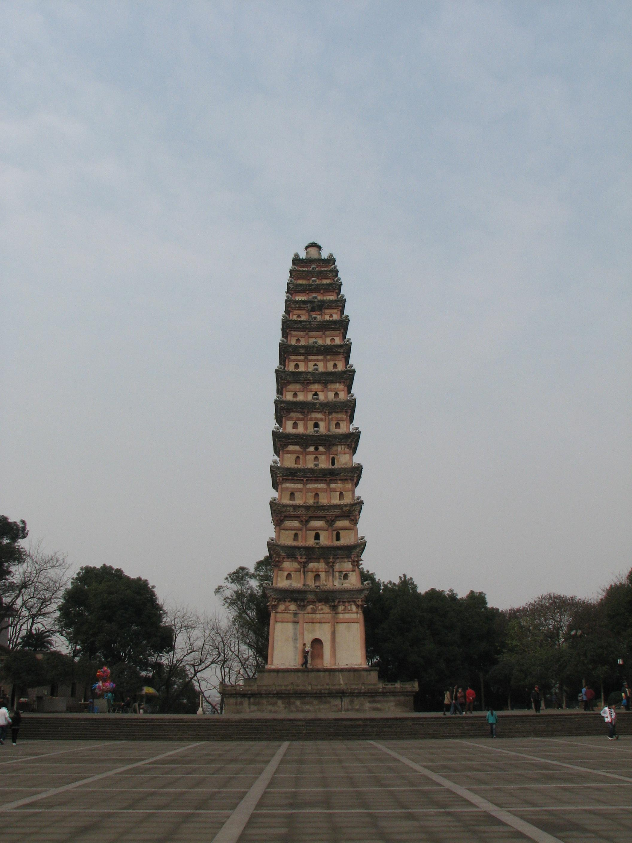 南充嘉陵江变的无量宝塔